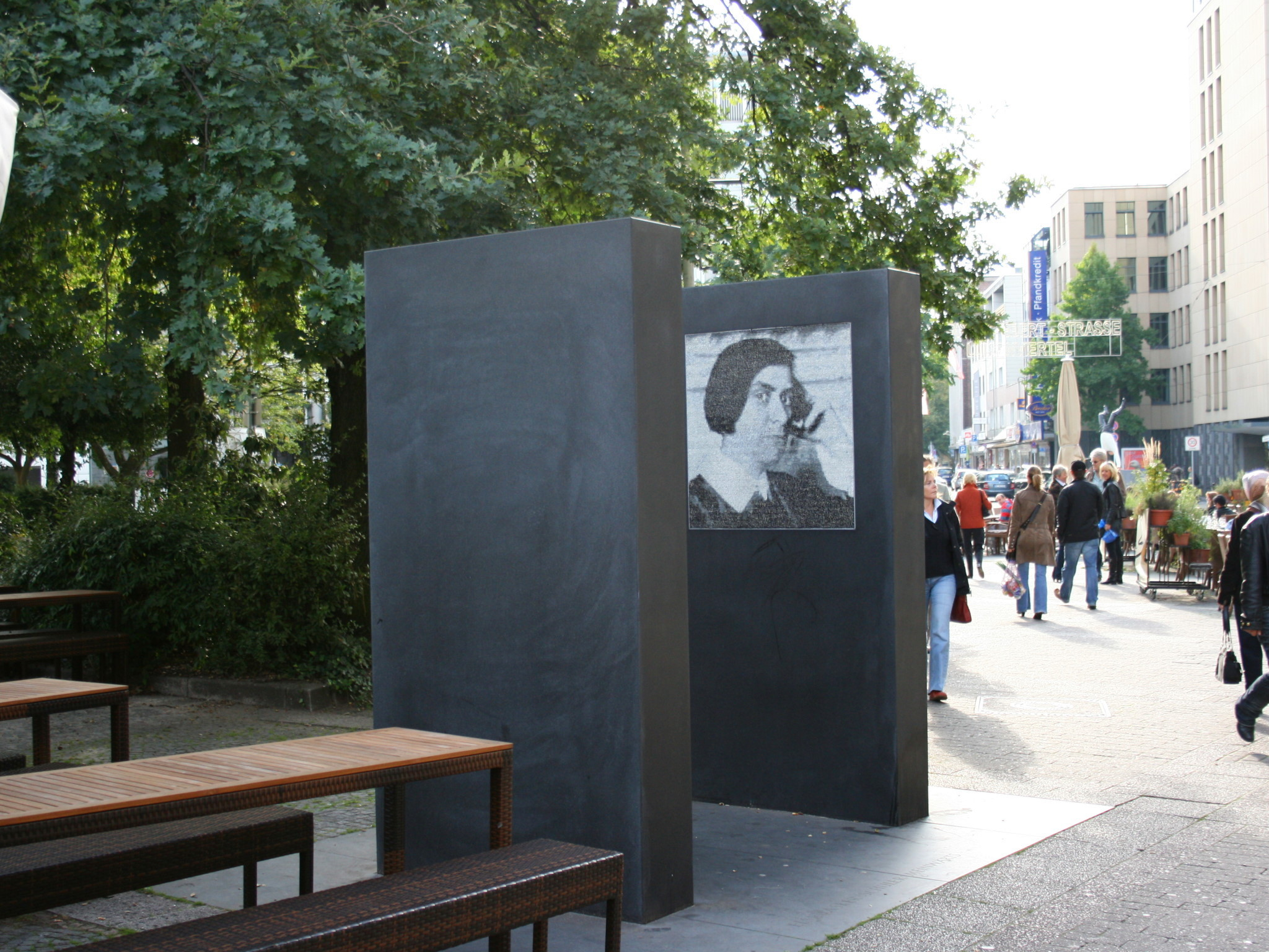 Denkmal für Else Lasker-Schüler in der Herzogstraße, Wuppertal-Elberfeld